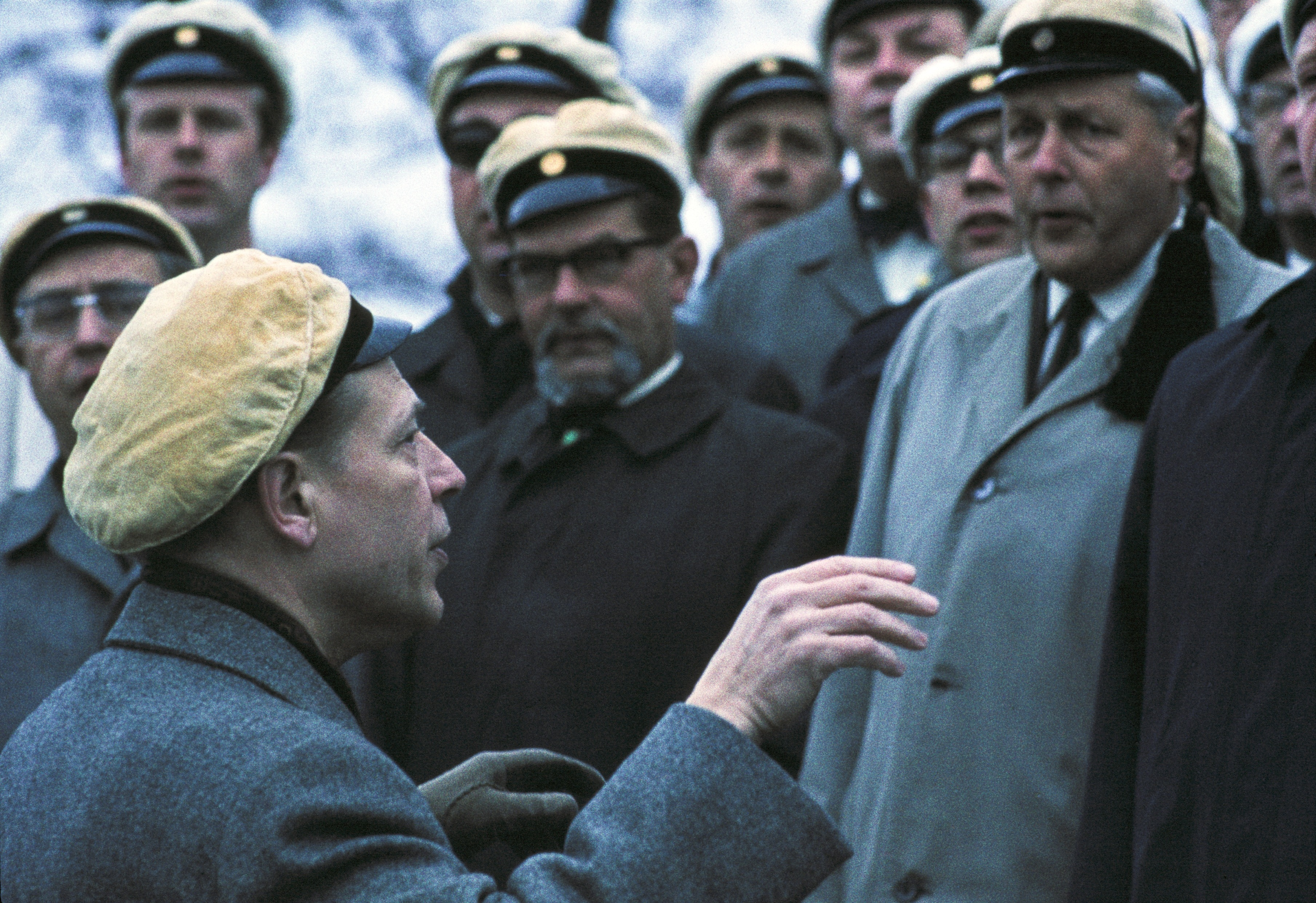 Ruotsinkielisten ylioppilaiden vapunviettoa Helsingin Kaisaniemessä. Akademiska Sångföreningen esiintyy. Erik Bergman johtaa kuoroa.